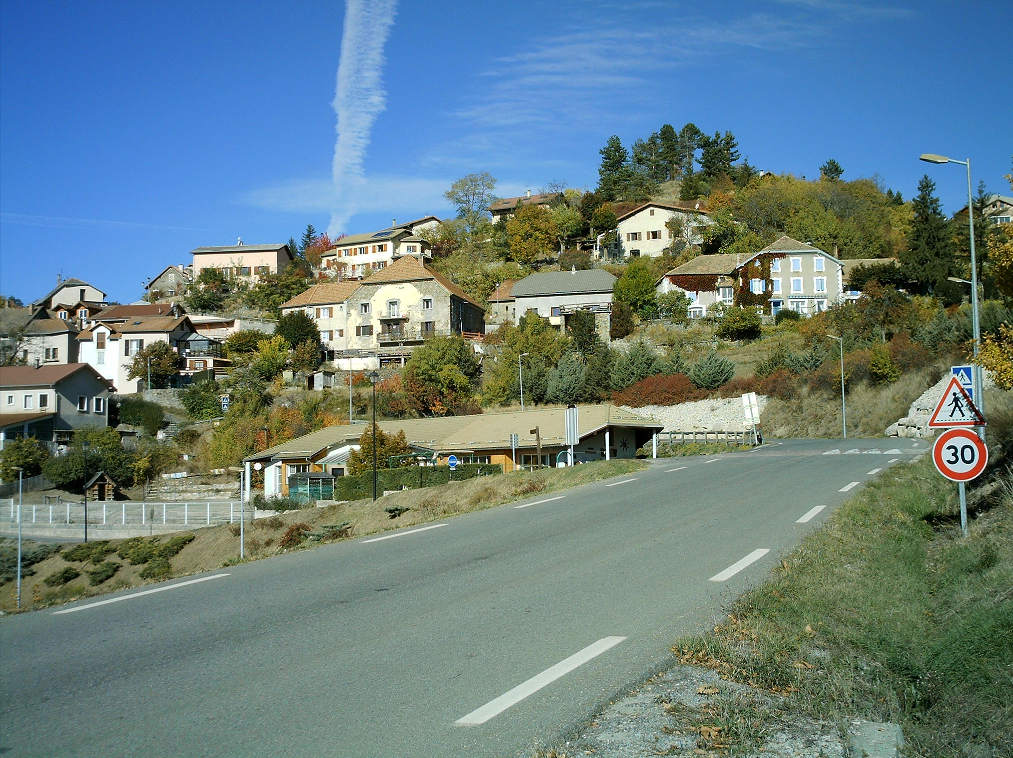 Vue de l'entrée du village de Pelleautier( Hautes-Alpes, France)